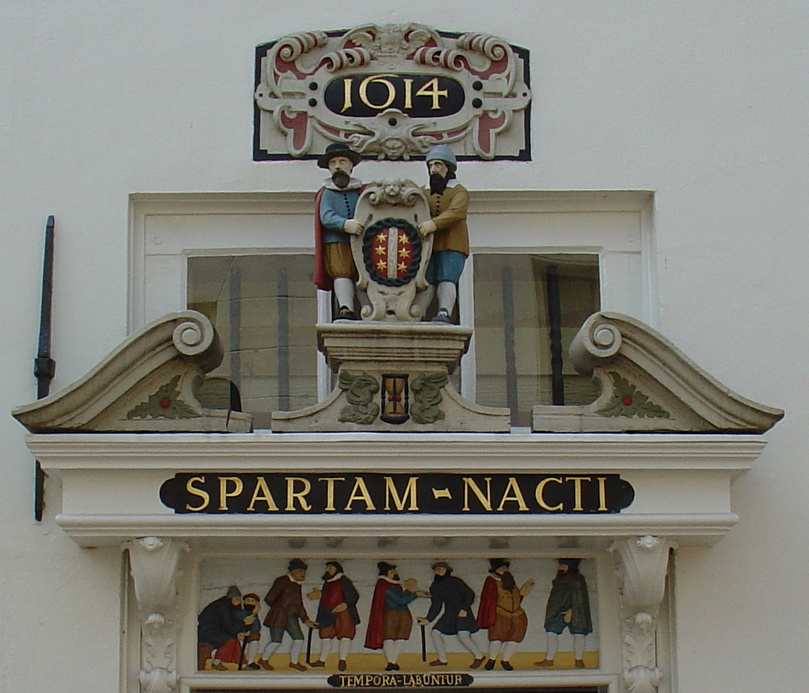 Toegangspoortje van het Willem Vroesenhuis gemaakt door de stadsbeelhouwer Gregorius Cool in 1614 (foto : Jan Lafeber 12 mei 2006 datum- en tijdinstelling op camera was niet juist)